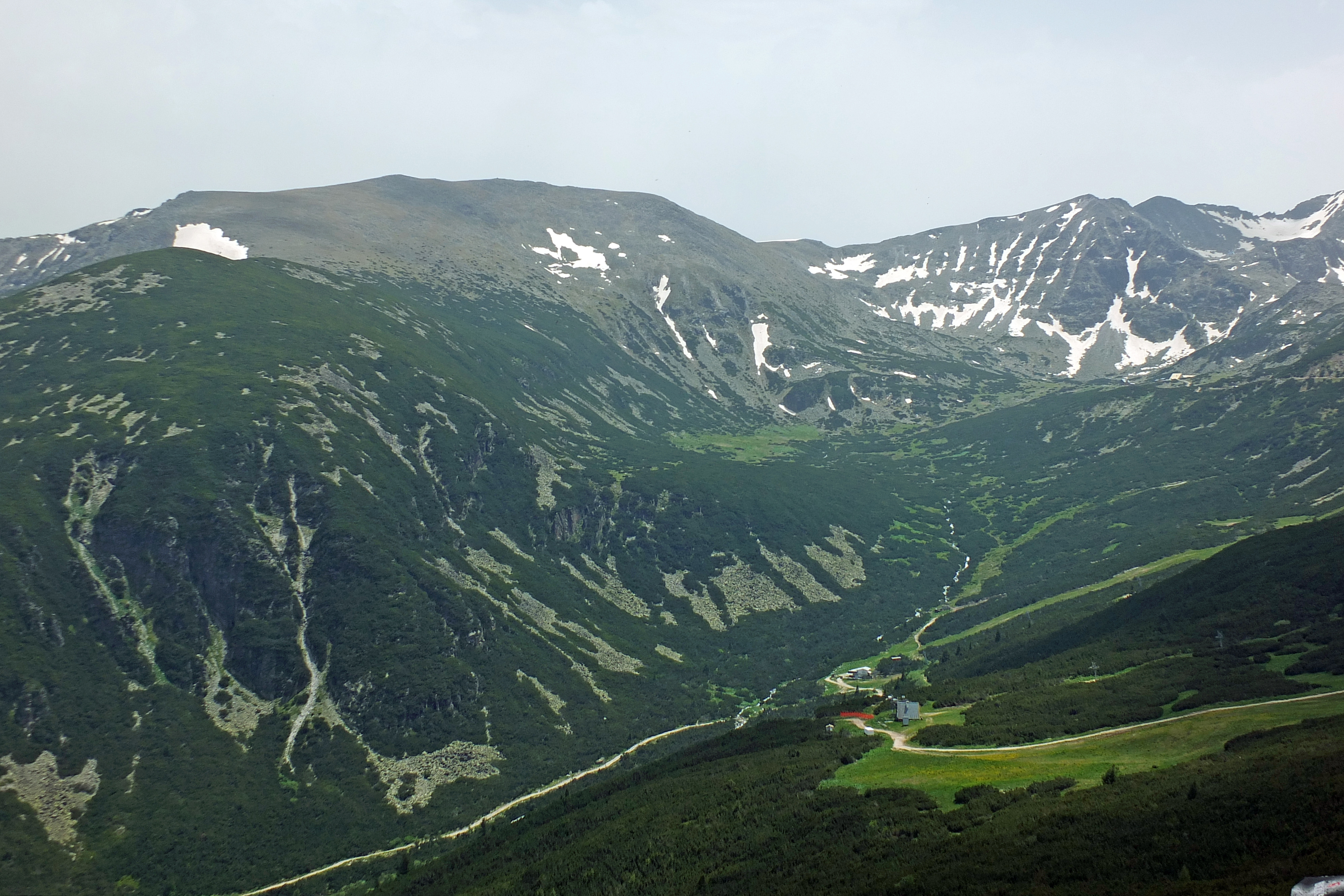 Рила, Рила Поглед към долината на р. Мусаленска Бистрица от вр. Ястребец